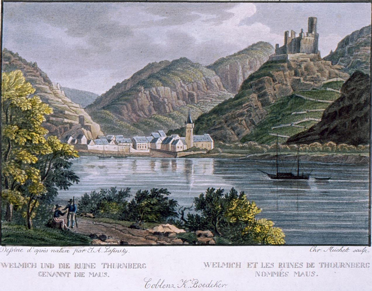 Altkolorierter Aquatintastich von Christian Meichelt nach Vorlage von J.A. Lasinsky um 1830